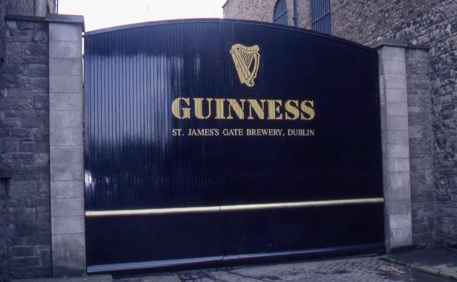 Guinness brewery